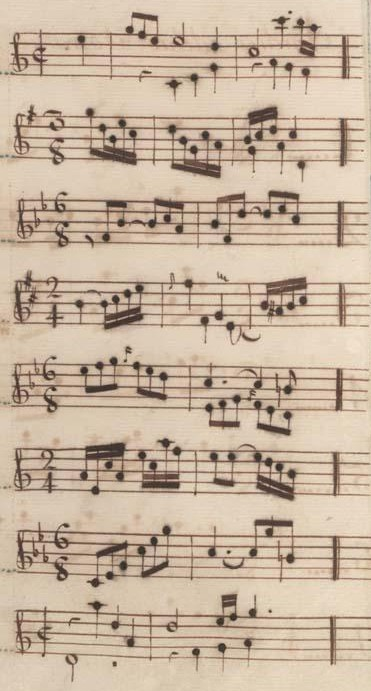 Table du volume I des manuscrits de Venise (incipit des sonates 23 à 30, K. 170 à 176)